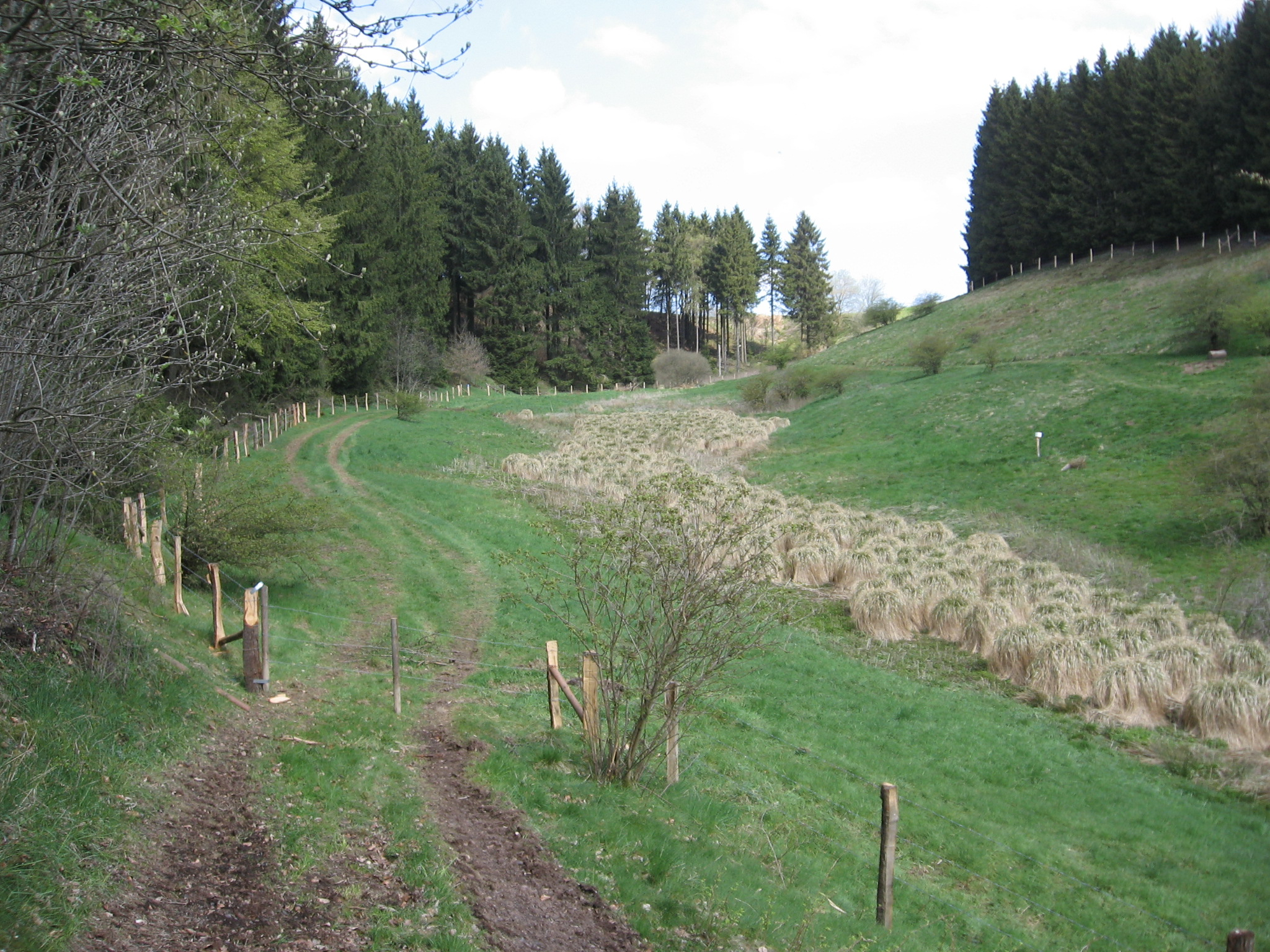 Bereich Judenloch im Naturschutzgebiet Katmecketal mit der Quelle der Katmecke. Bachlauf zwischen Grasbulten nicht zu sehen. Waldbereiche links und rechts gehören nicht zum NSG. Im Quellbereich und am Bachrinnsal wachsen Rispen-Seggen.